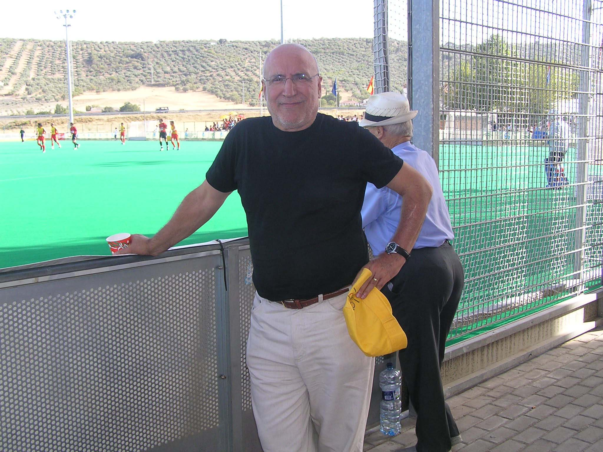 Ramón Trecet durante su visita a un torneo de hockey hierba, en Alcalá la Real, Jaén, España.